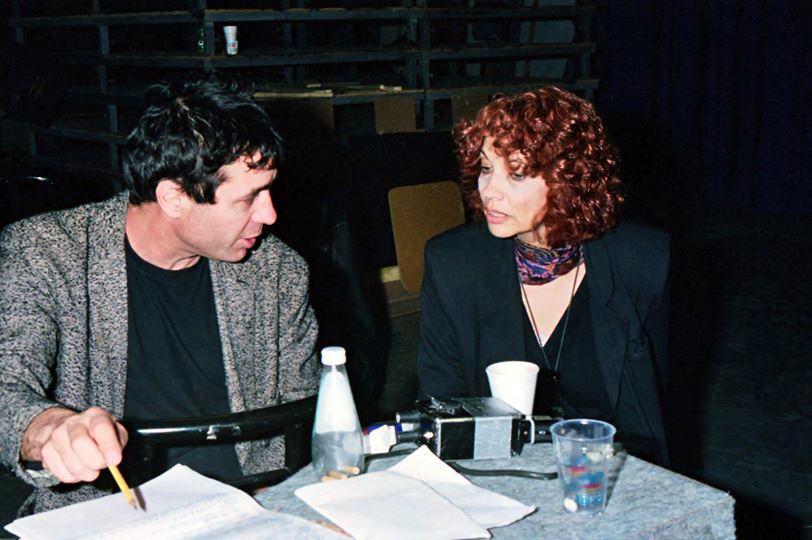 יהונתן גפן ונורית גפן מקובר